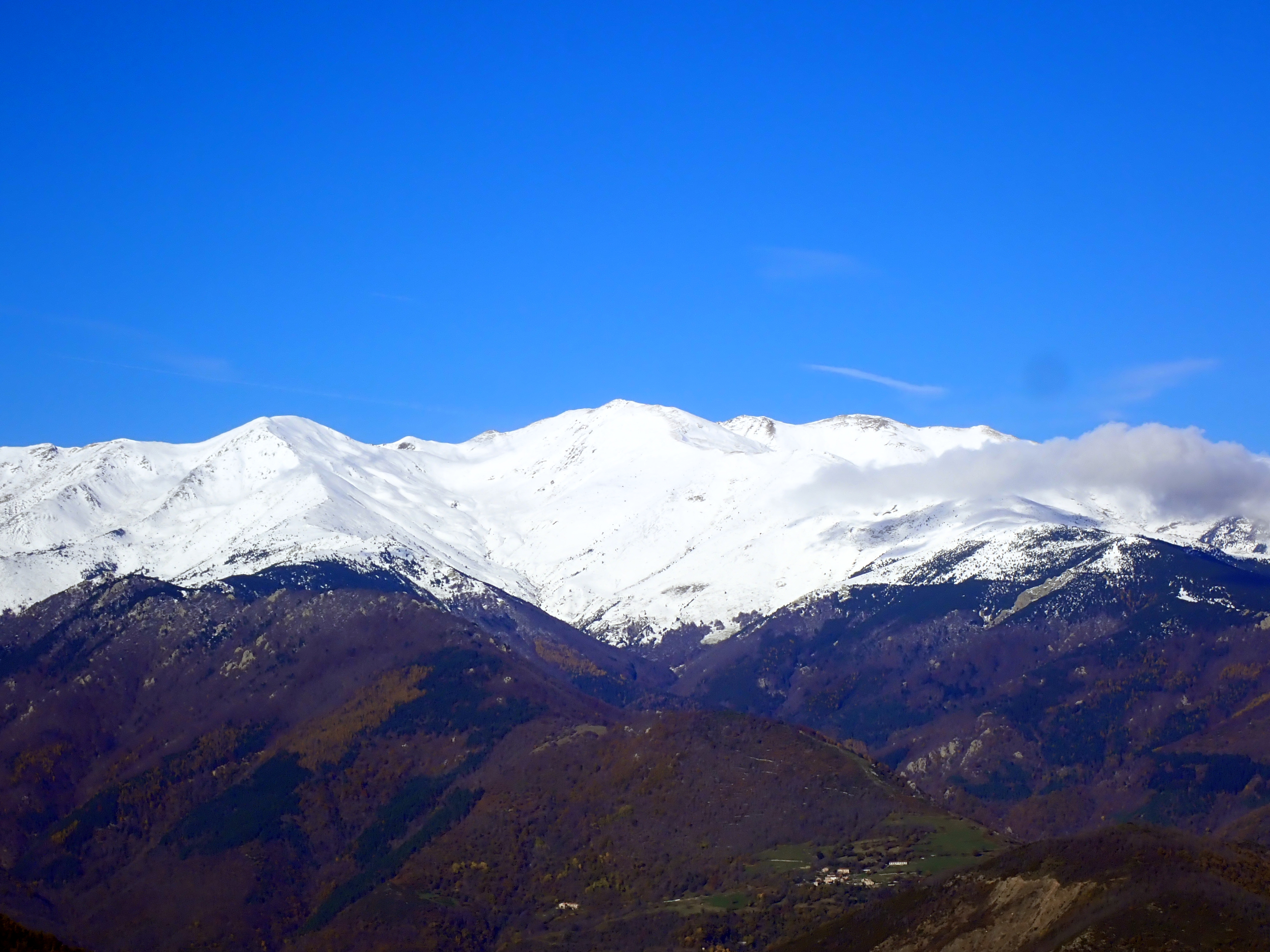 El cim de Tretzevents al massís del Canigó des de Torres de Cabrenç